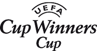 logo de la Recopa de Europa de fútbol